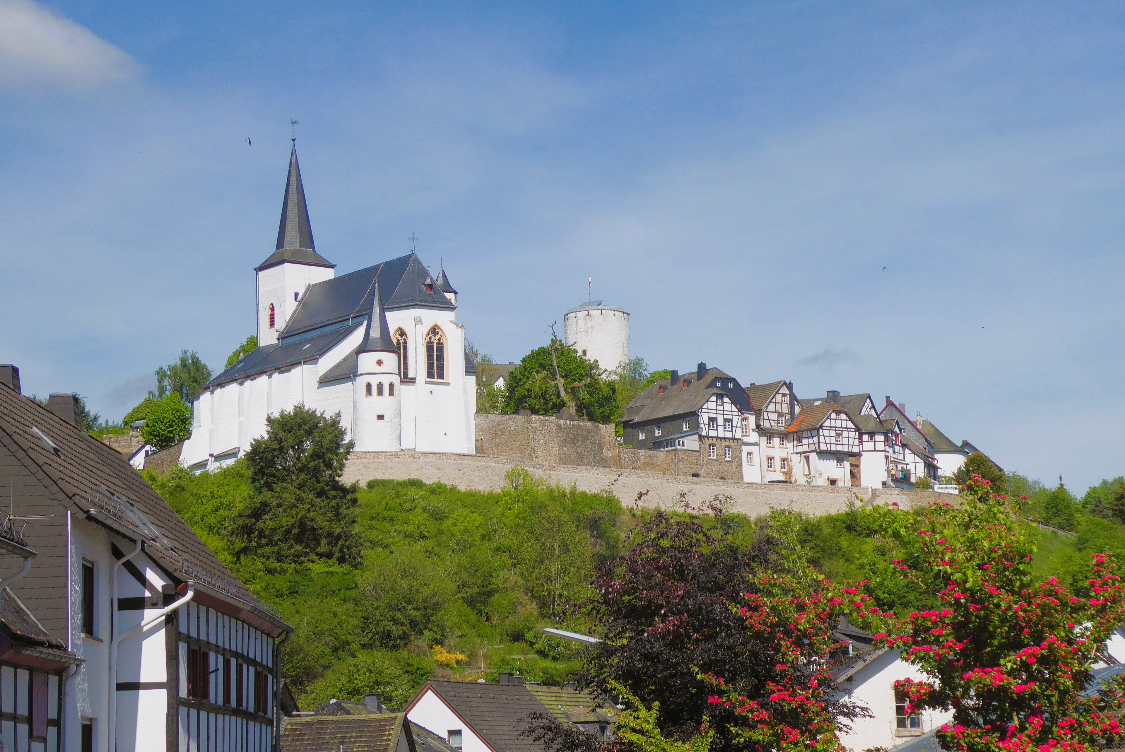 St. Matthias, Hellenthal-Reifferscheid